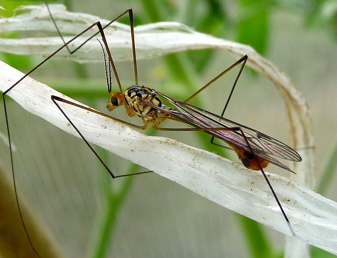 Resembles Craneflies